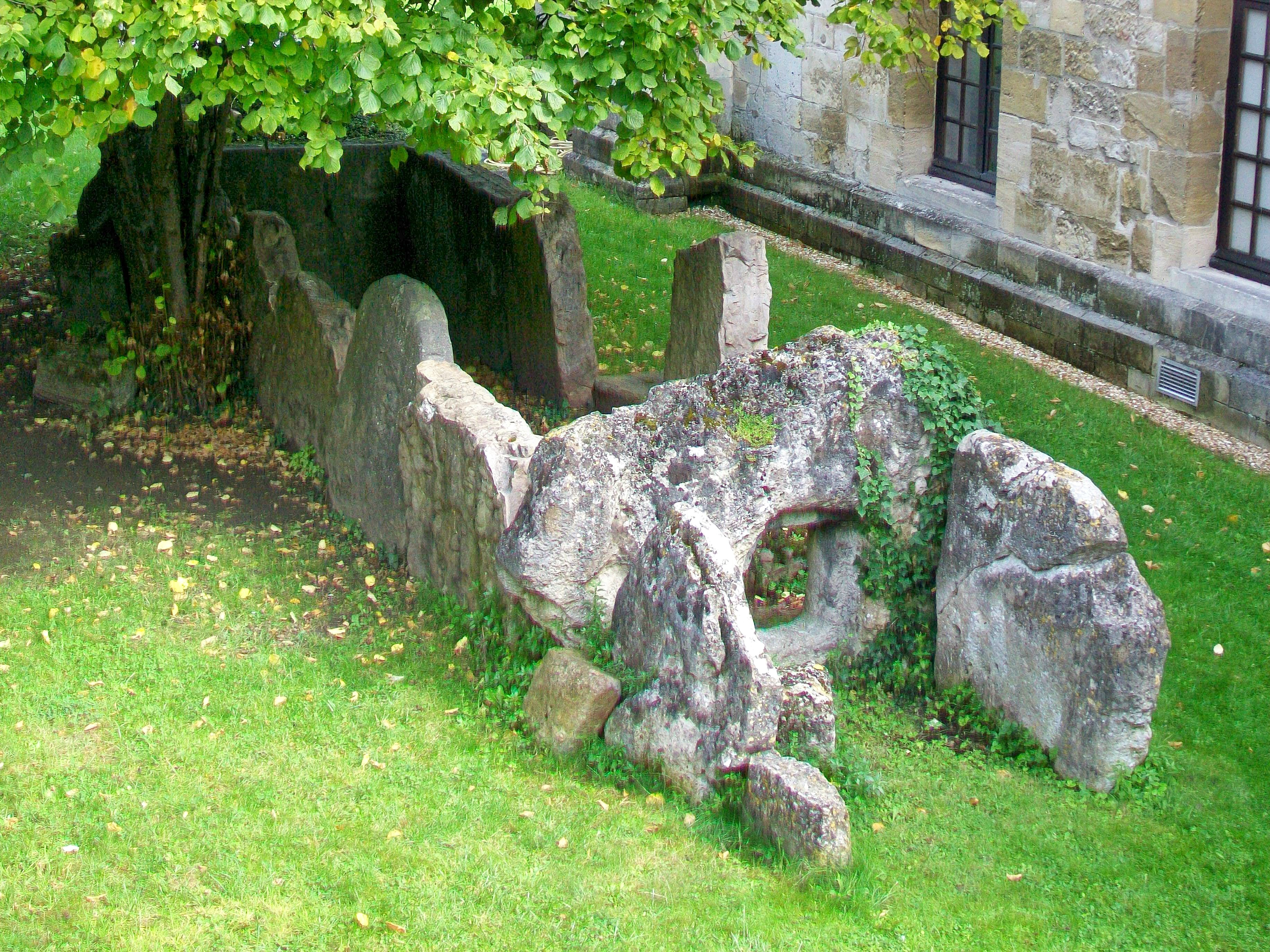 La galerie couverte découverte en 1885 sur le domaine du château de Dampont à Us (95), et transférée dans le jardin du musée Tavet-Delacour de Pontoise en 1886.